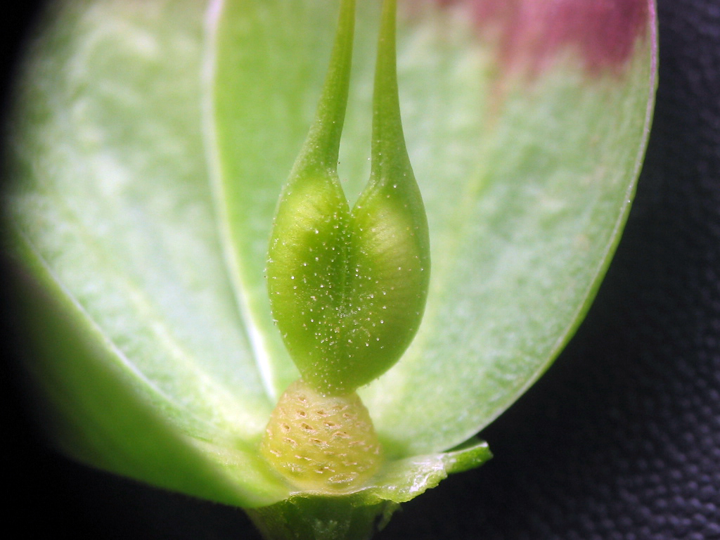 Helleborus foetidus detalle